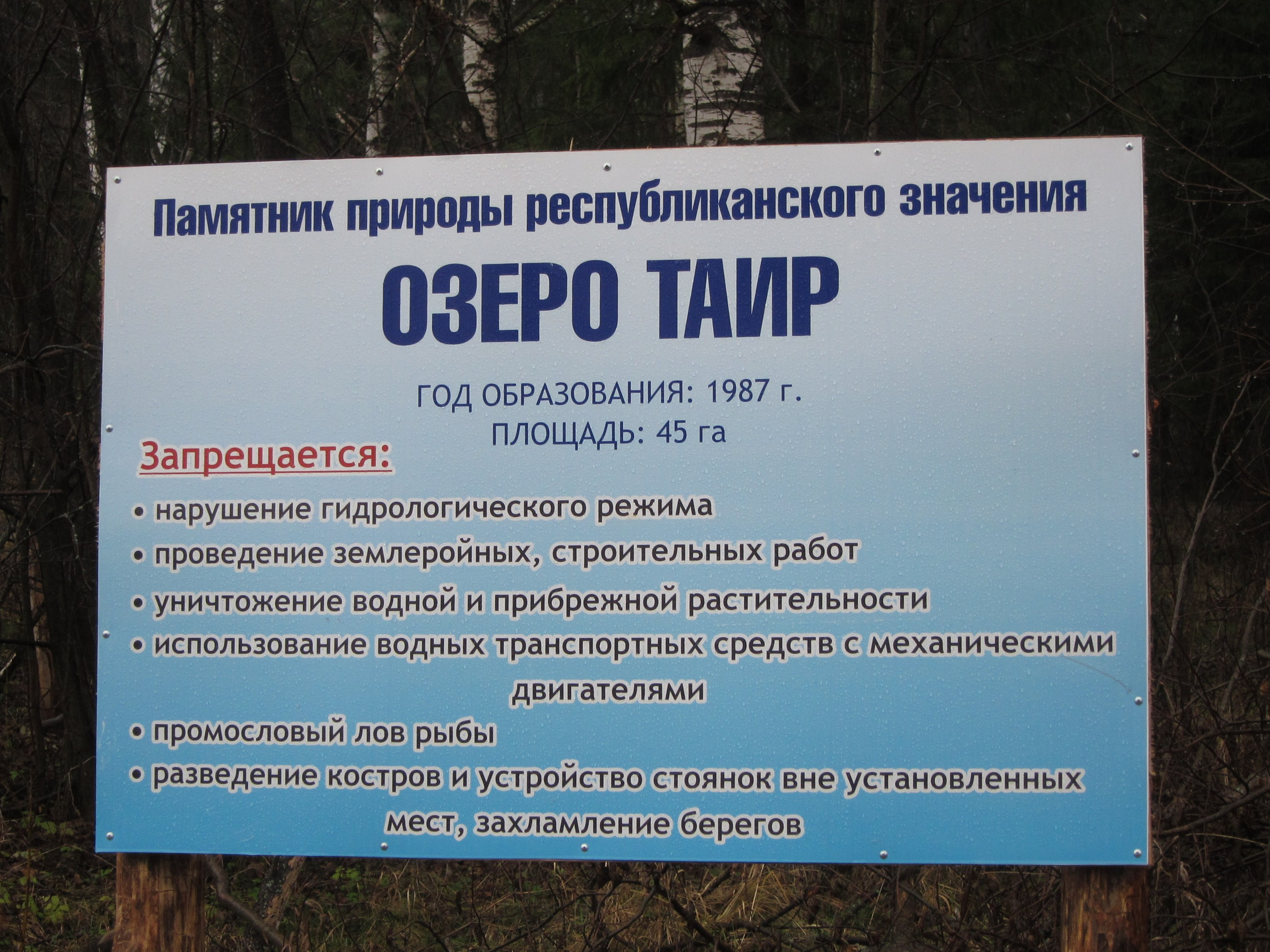 Баннер, озеро Таир, Республика Марий Эл. Дата съёмки - ноябрь 2013 г.